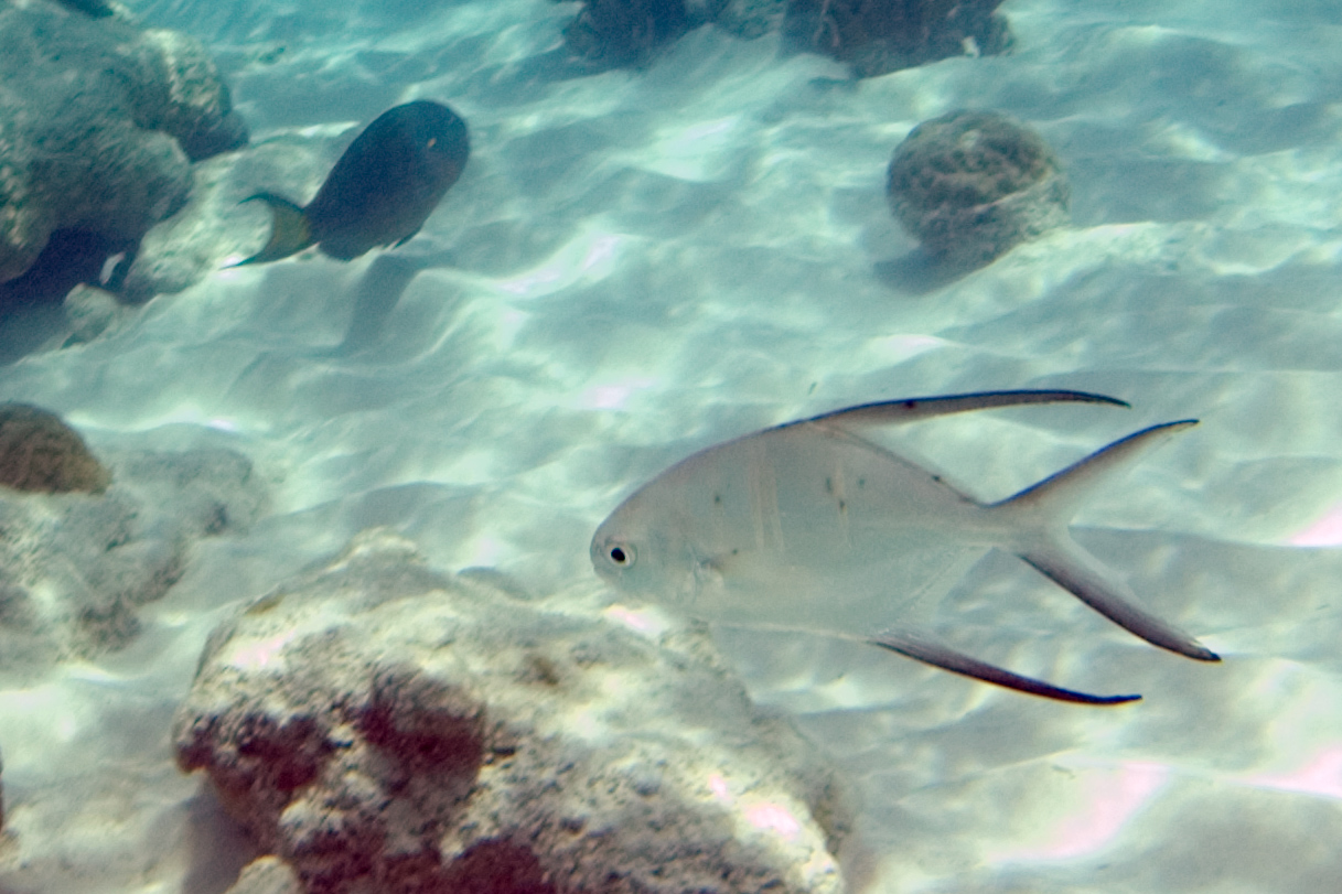 palometa Trachinotus goodei